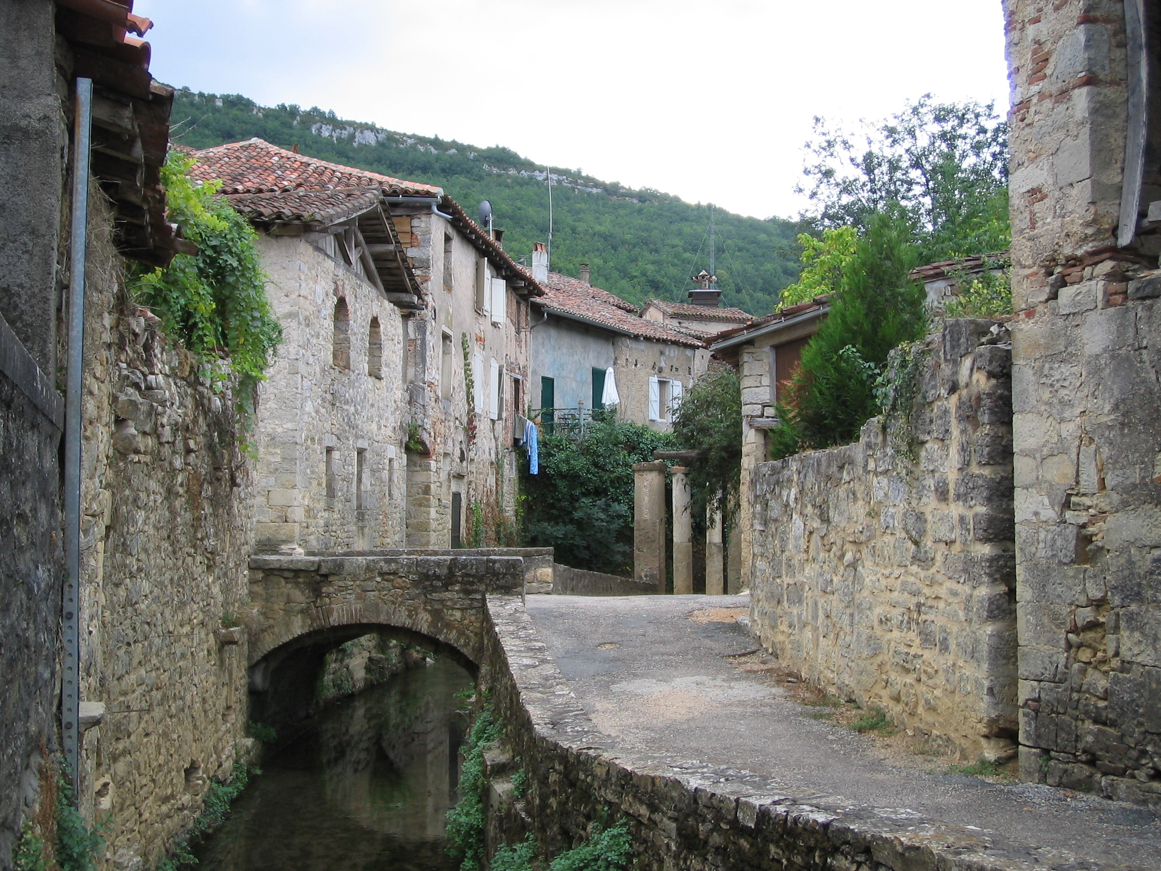 Ruelle bordée d'un ruisseau vue du lavoir à Saint-Antonin-Noble-Val (France, Tarn-et-Garonne).